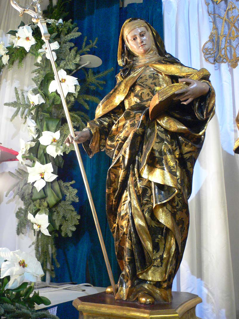 Talla barroca de Santa Florentina realizada por Francisco Salzillo en el s.XVIII. Iglesia de Sta.María de Gracia en Cartagena (España)